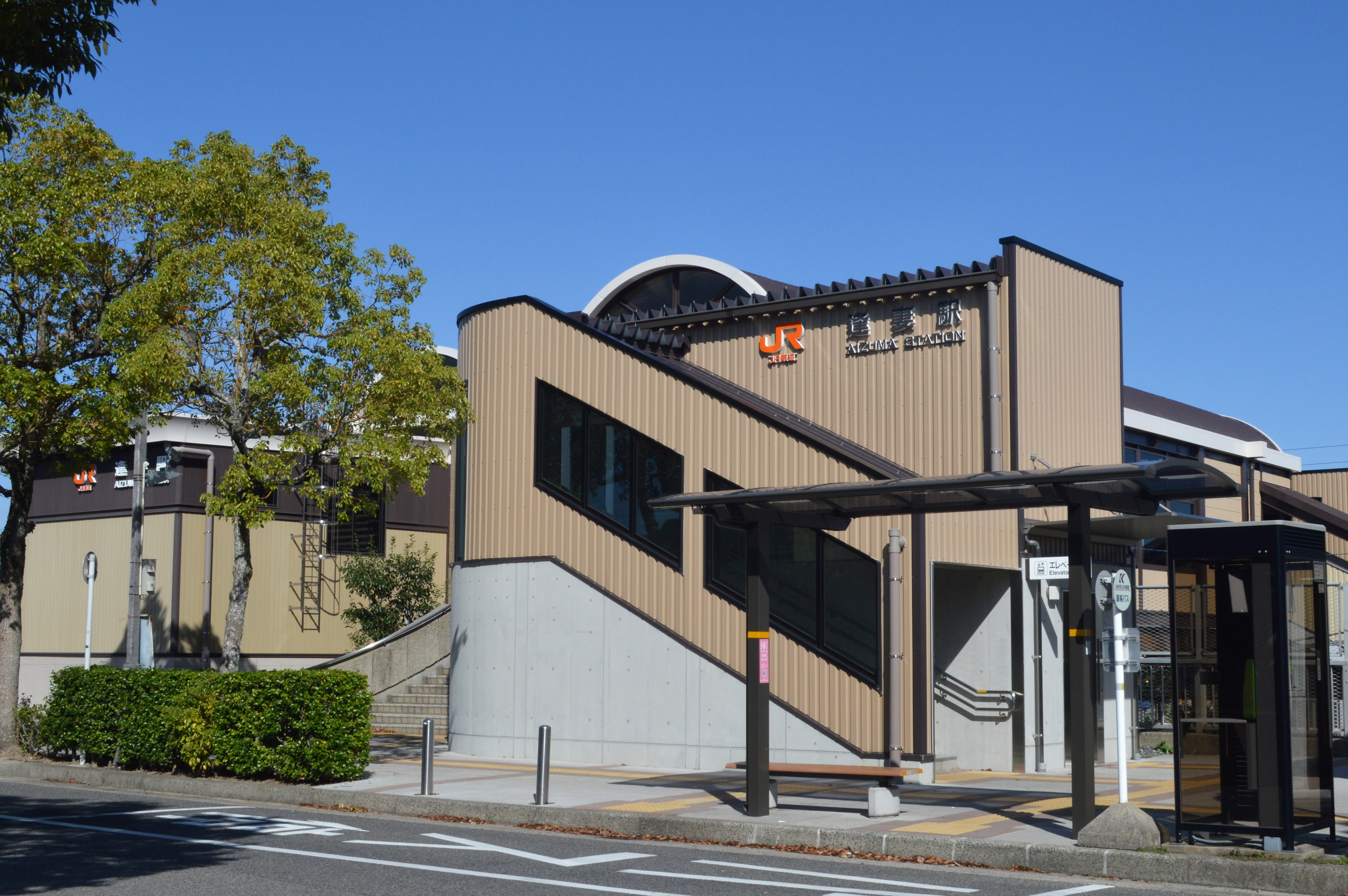 愛知県刈谷市にあるJR東海道本線逢妻駅。南口。